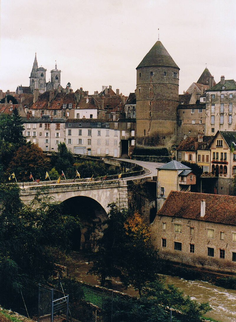 Semur-en-Auxois, France 1993